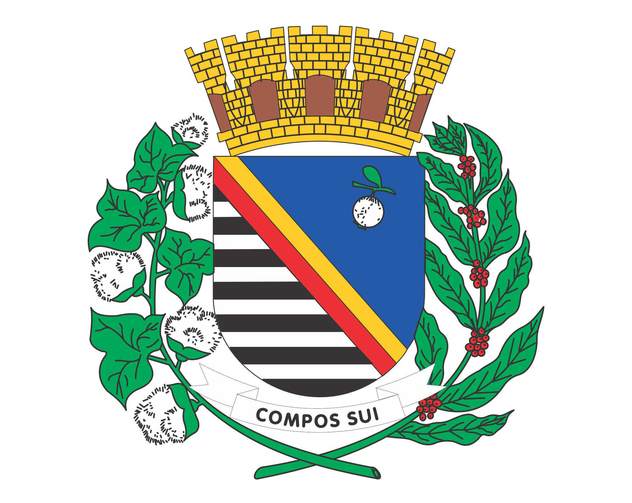 Brasão de Araçatuba